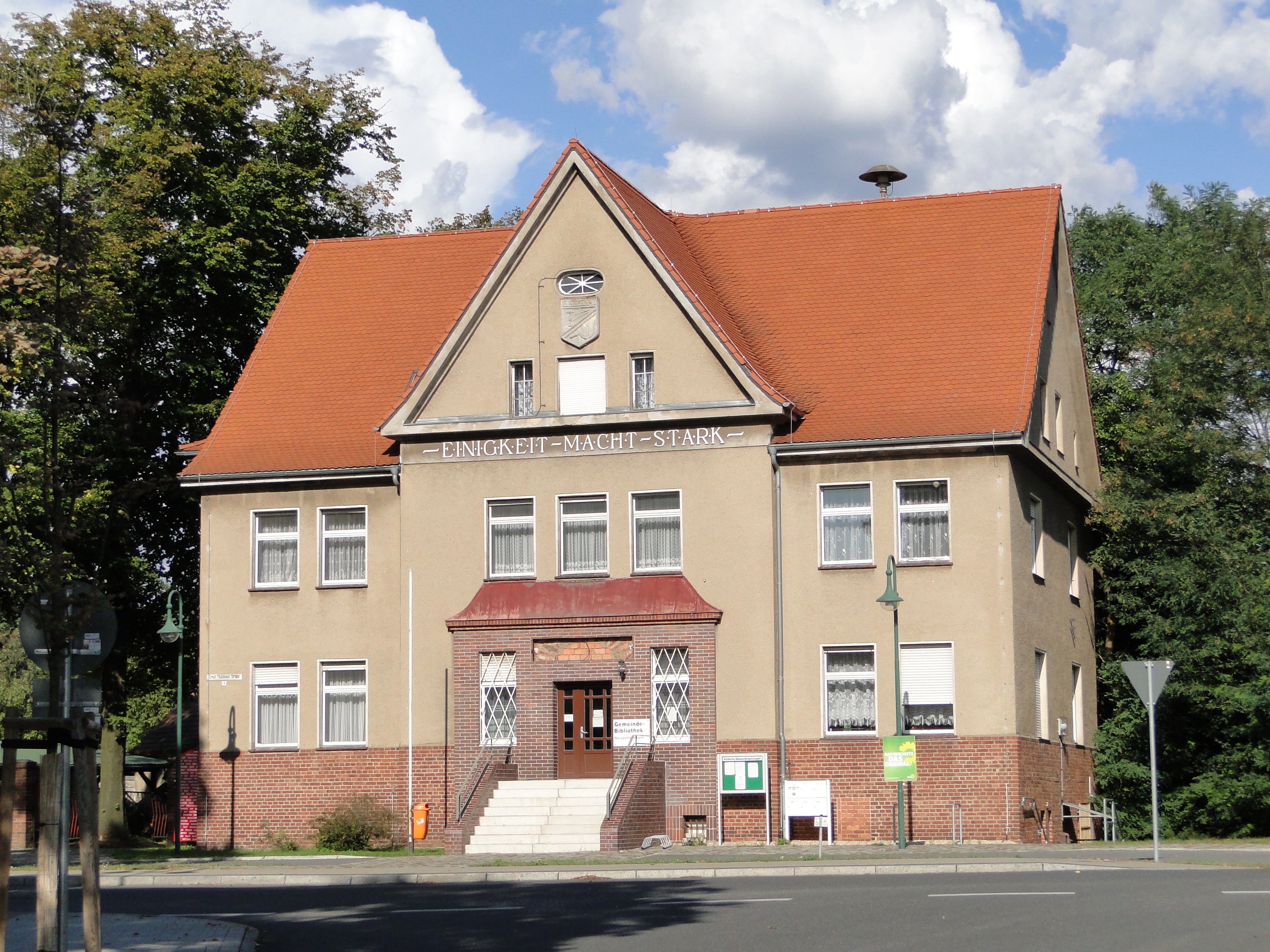 Ernst-Thälmann-Straße 1 Neupetershain Rathaus